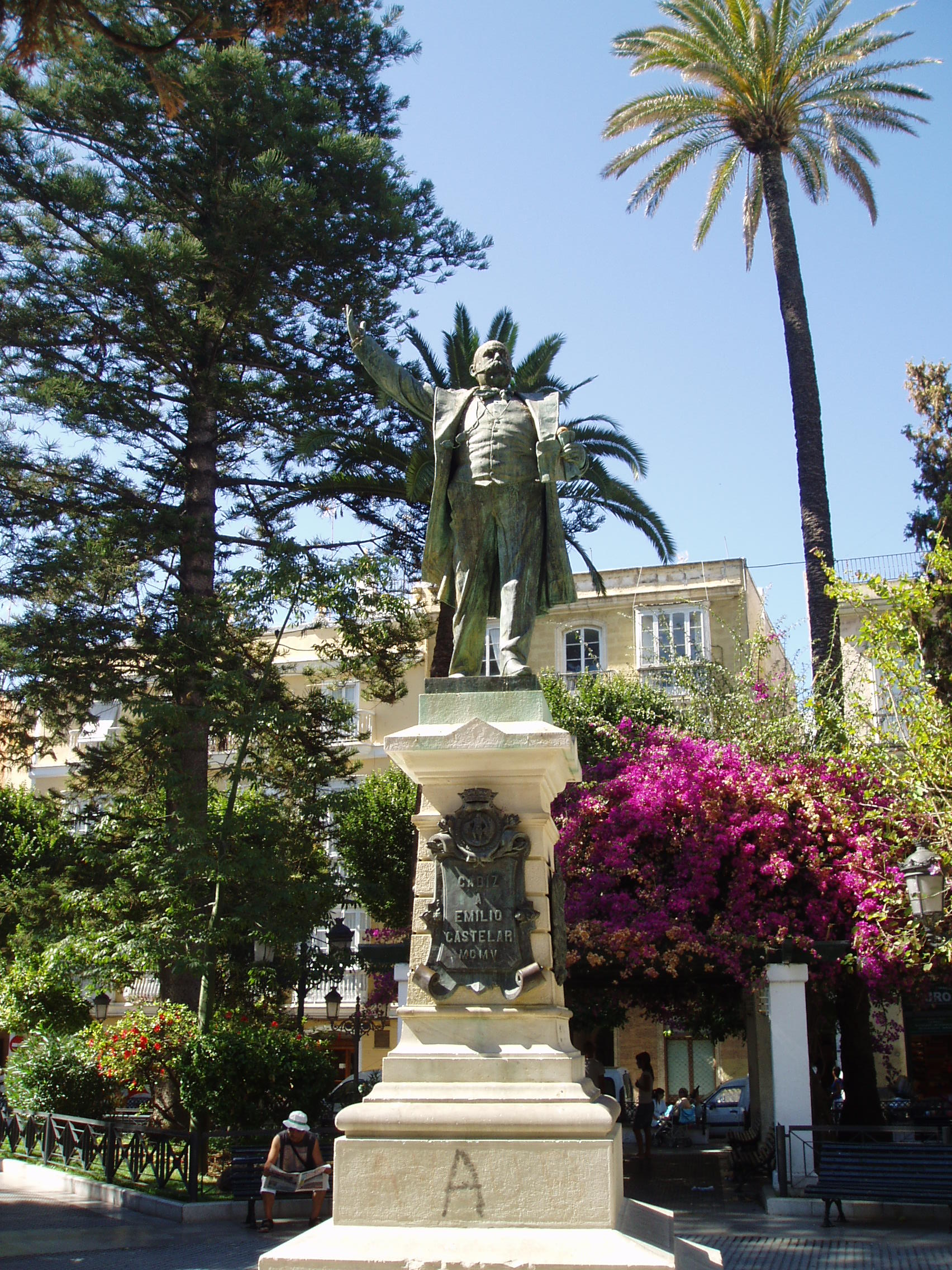 Monumento dedicado a Castelar en la Plaza de la Candelaria de Cádiz.